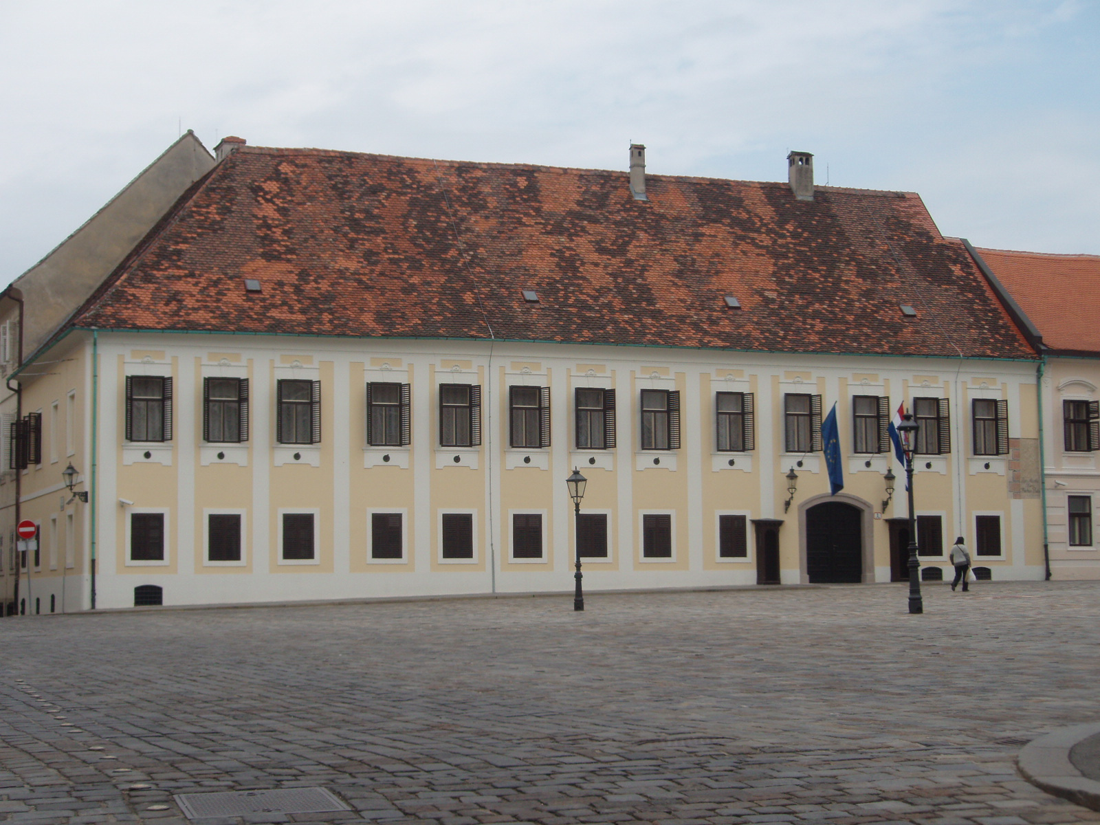 Banski dvori